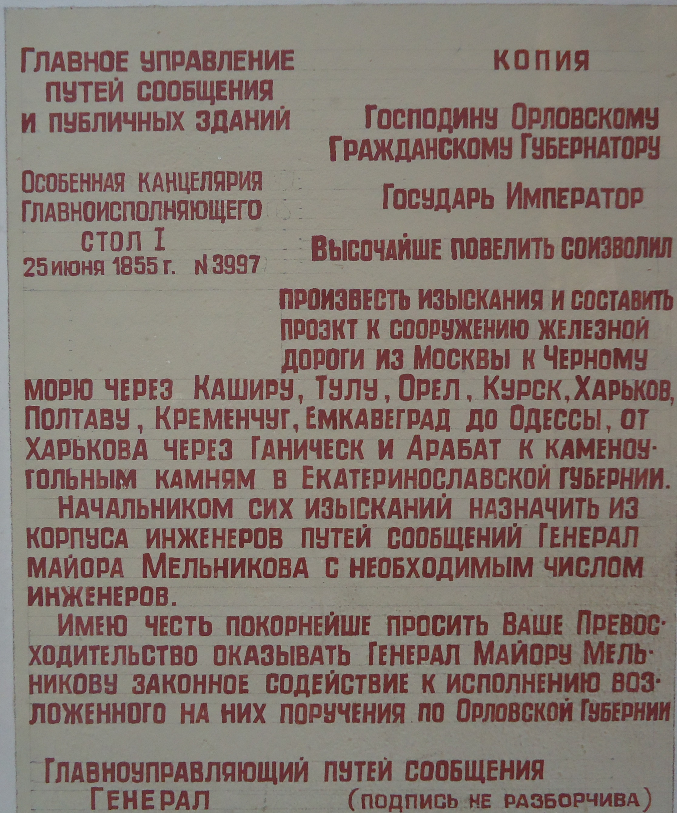 1855г. Обращение о строительстве